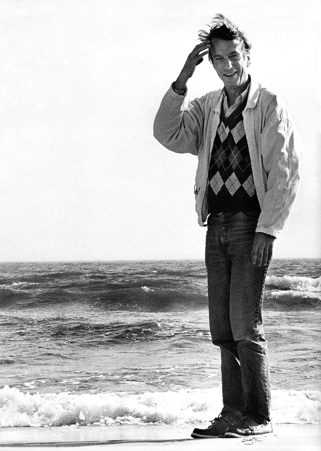 Anders Hallström vid Ystads Saltsjöbad 1985.